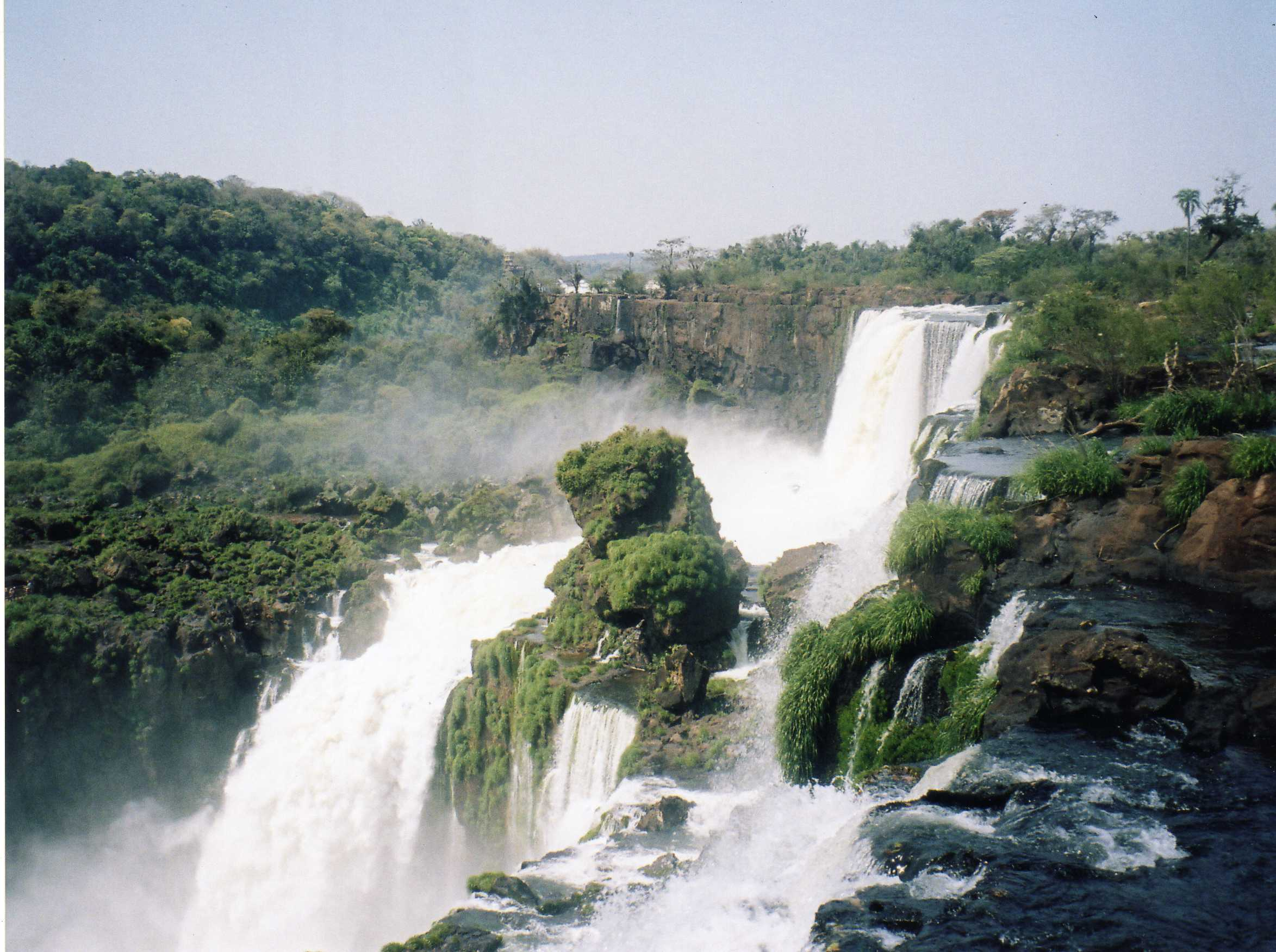 Cataratas del Iguazú, del lado argentino.